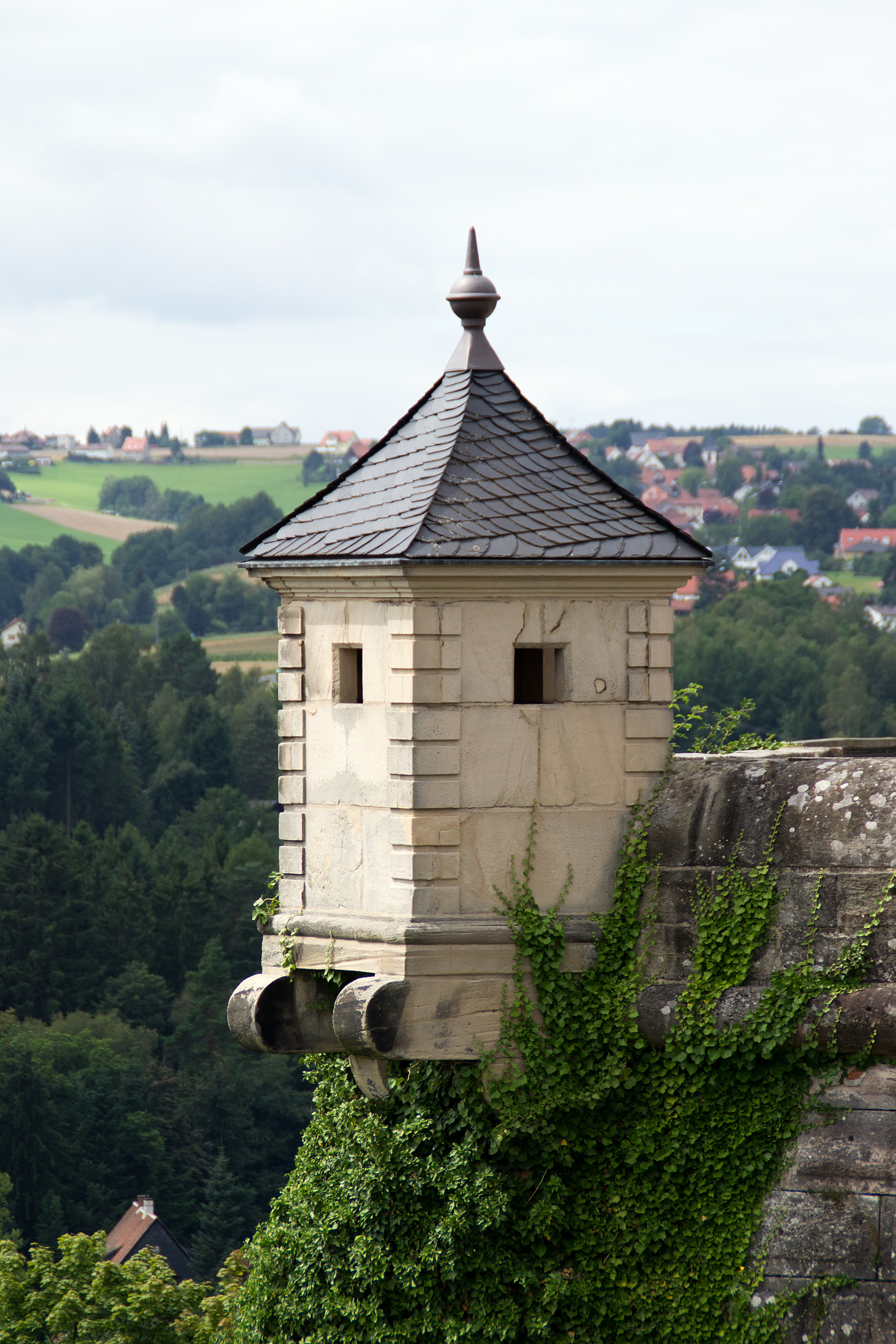 Wachhäuschen am südöstlichen Eckpunkt der Bastion St. Kunigunde der Festung Rosenberg in Kronach. Das Foto zeigt eine Rekonstruktion aus dem 20. Jahrhundert; die ursprünglich 14 Originalbauwerke an den Eckpunkten der fünf Bastionen der Festung sollen im Jahr 1806 auf Geheiß des französischen Kaisers Napoleon, der vor seinem Feldzug gegen Preußen in Kronach lagerte, entfernt worden sein, da sie feindlichen Truppen als Zielpunkt für Geschütze hätten dienen können.